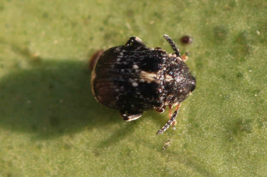 Bruchus rufimanus am 3.5.2017 südl. Mannheim